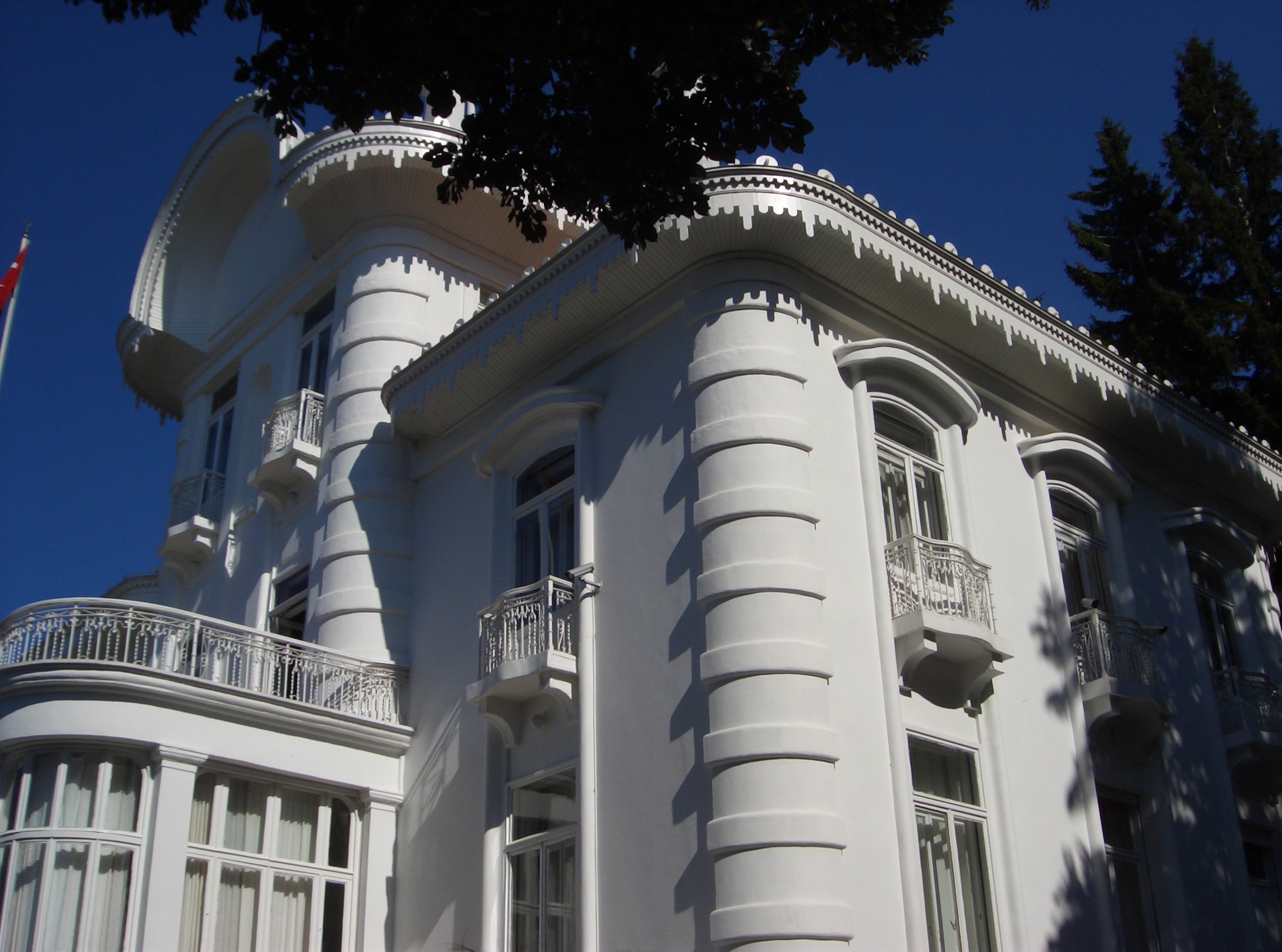 Trabzon Atatürk Köşkü